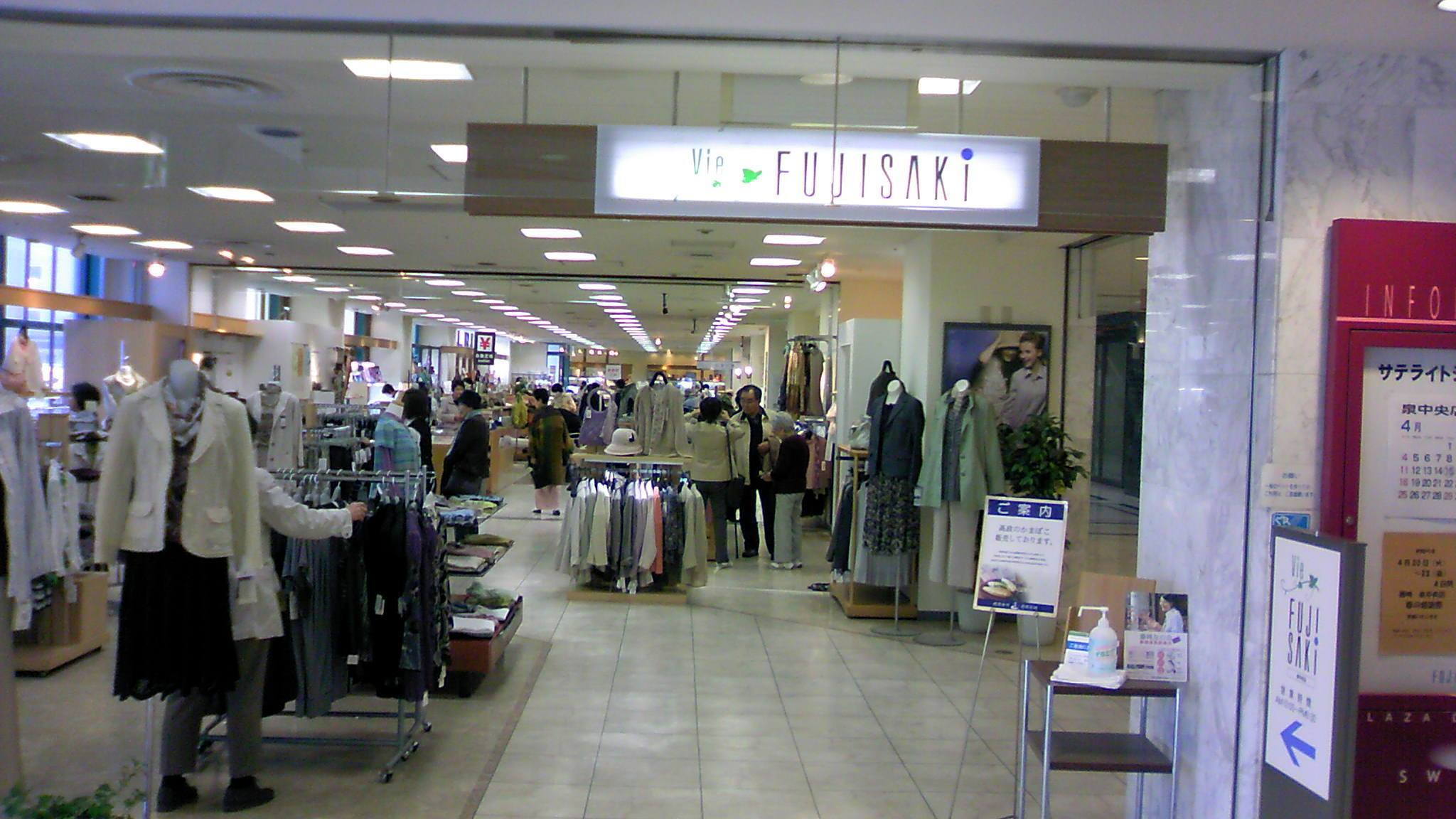 Vie FUJISAKI泉中央店